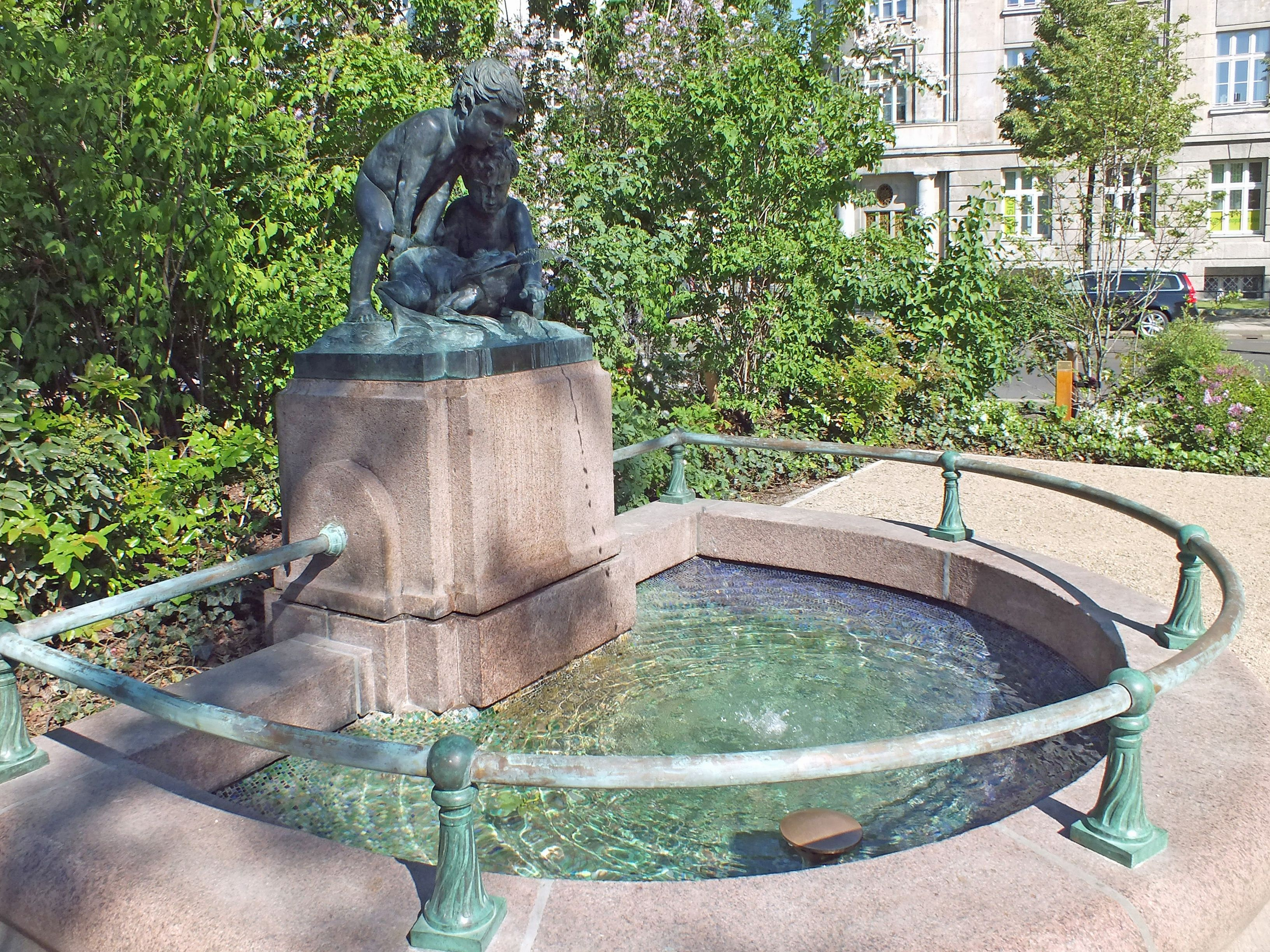 Der 2018 wieder aufgestellte Froschbrunnen auf dem Rabensteinplatz in Leipzig, angefertigt von Markus Gläser nach dem Vorbild von 1909